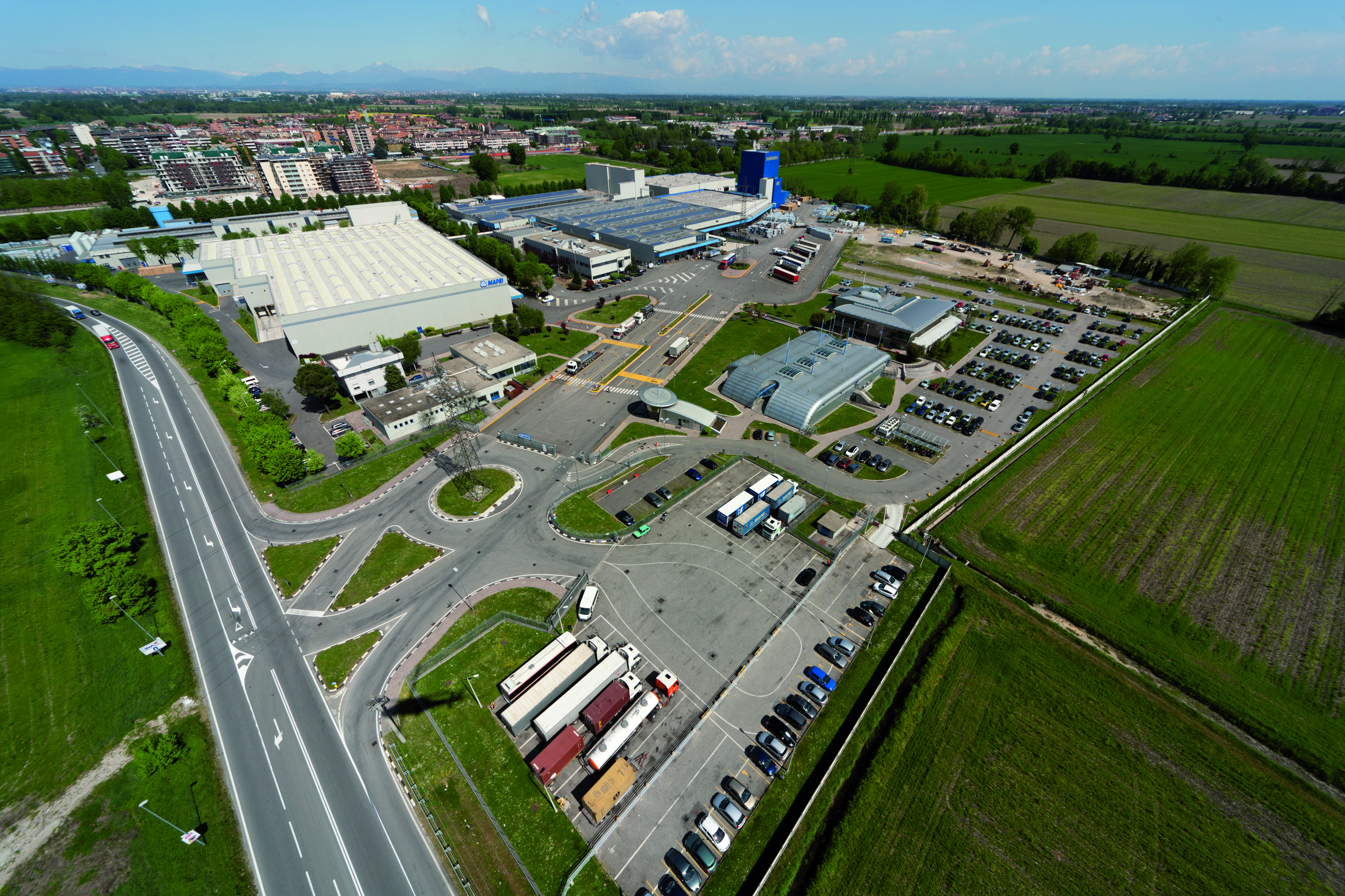 Stabilimento Mapei a Robbiano di Mediglia